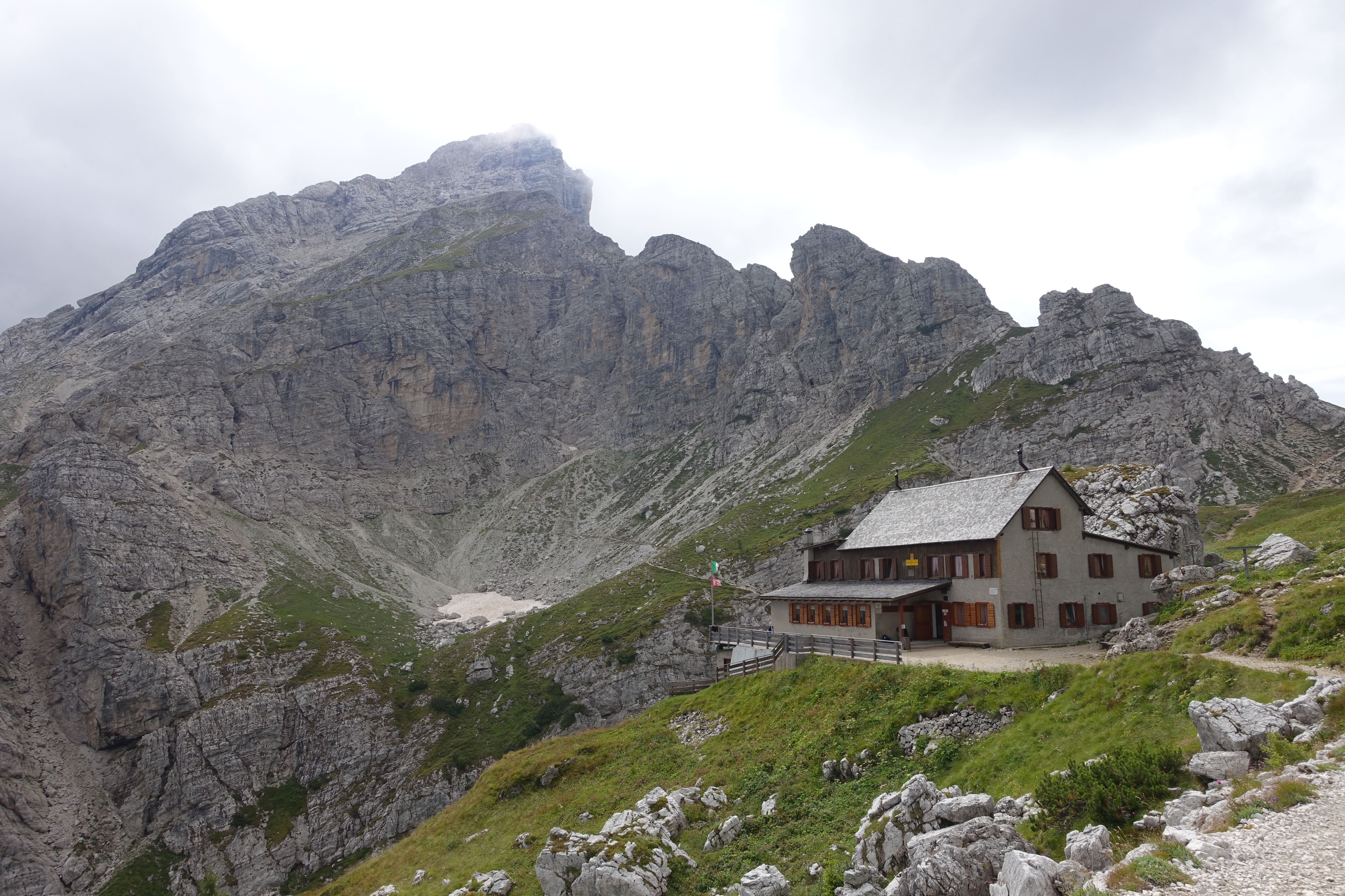 32010 Zoldo Alto, Province of Belluno, Italy